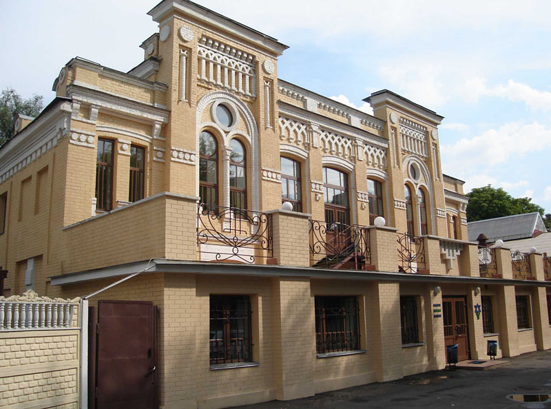 Фасад Галицкой синагоги